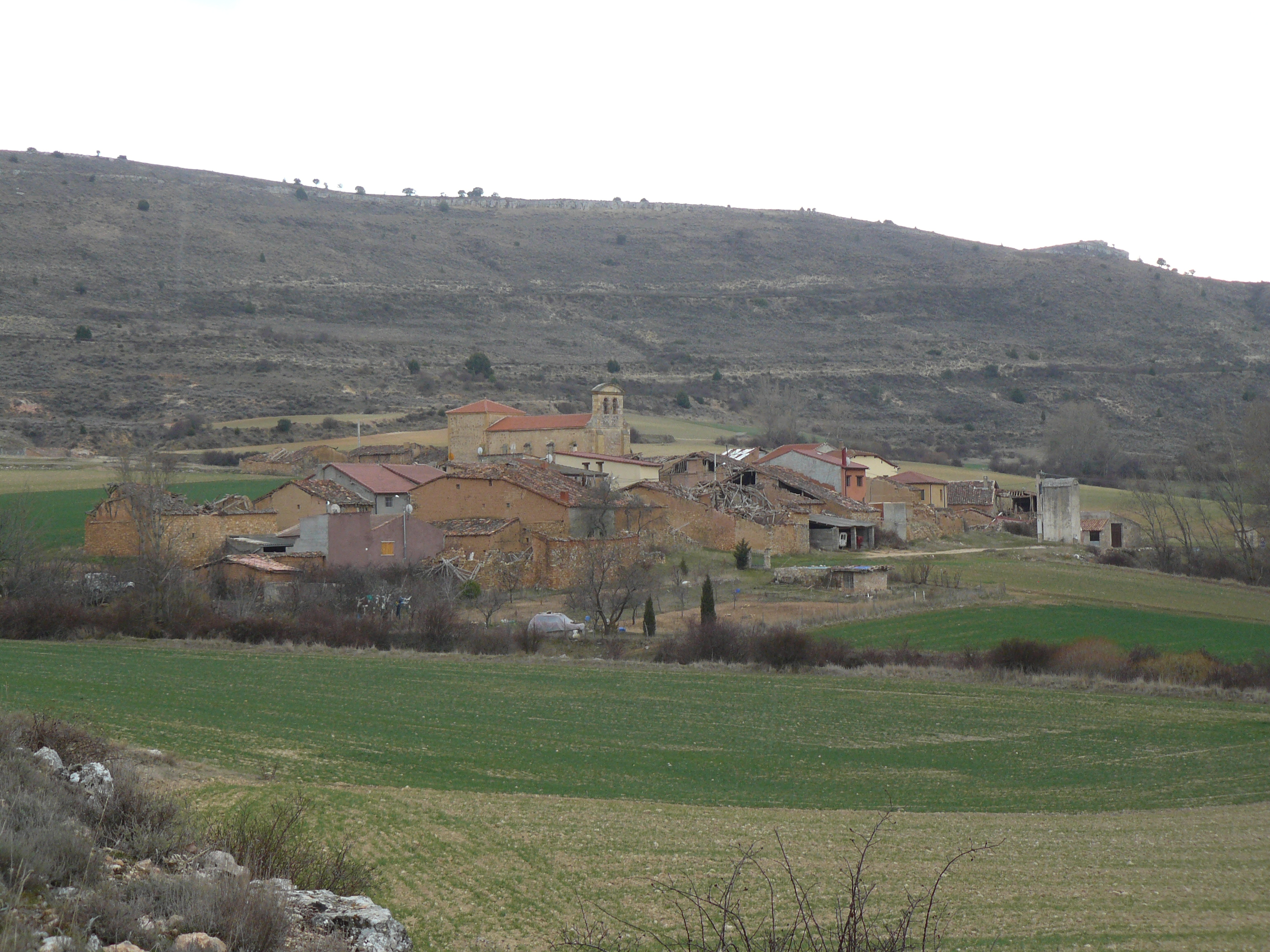 Hoz de Abajo, Soria..